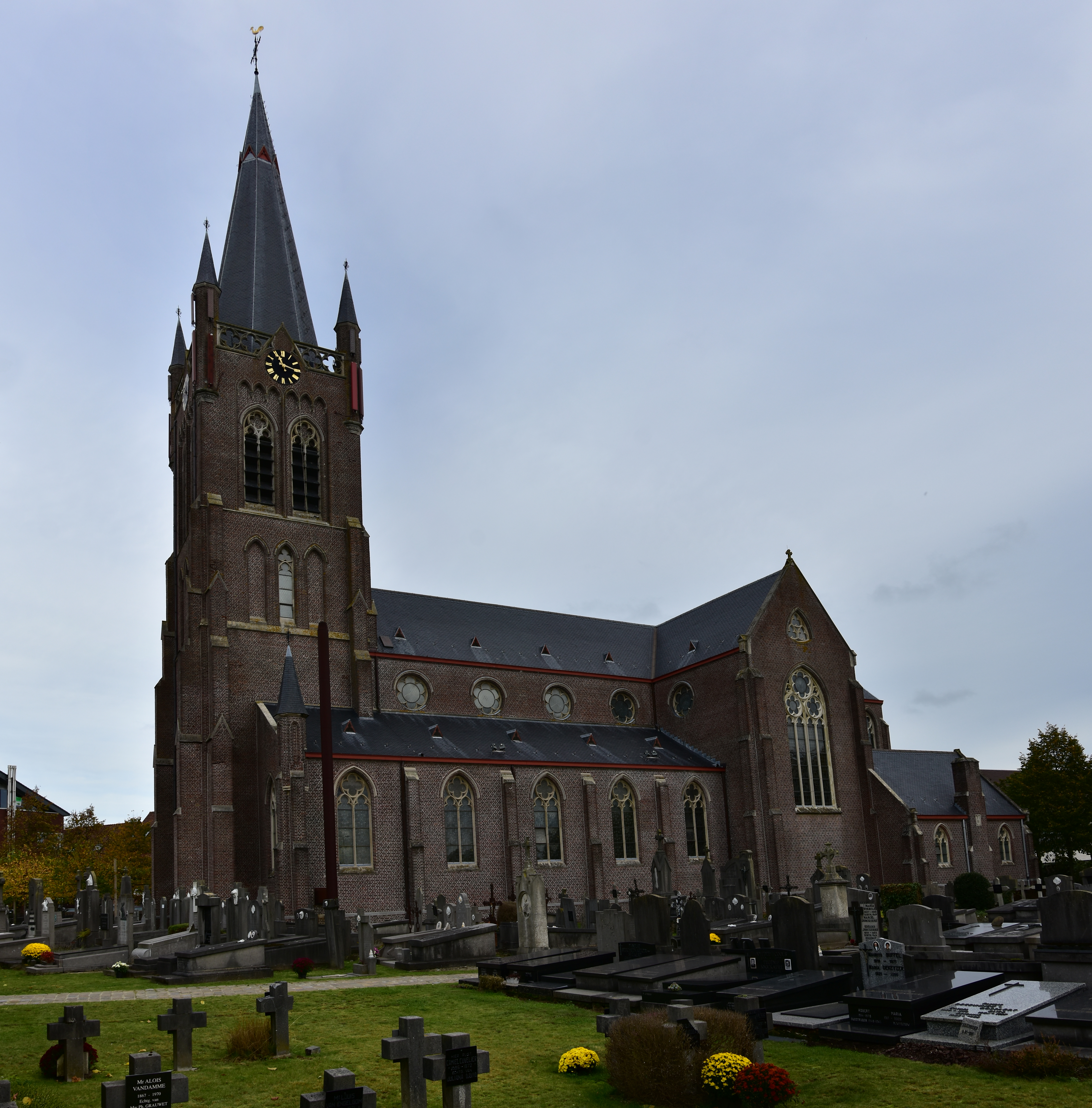 Sint-Blasiuskerk (Jabbeke) (88727) 27-10-2019 12-16-36 This photo of immovable heritage has been taken in the Flemish Region